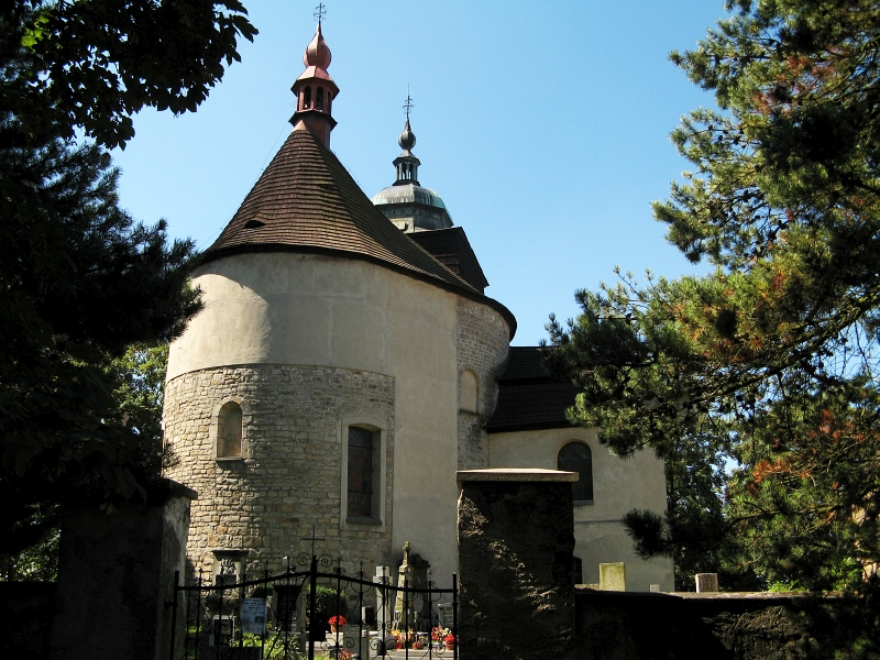 Kostel sv. Jana Křtitele (Pravonín), Pravonín